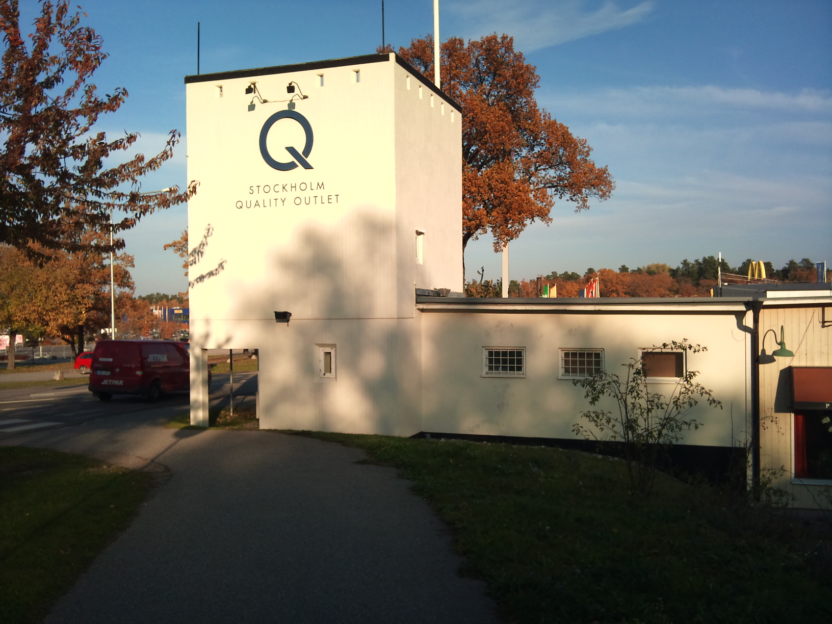 Före detta vaktkasernen vid F 8 Barkarby, sedan 1990-talet en del av Stockholm Quality Outlet i Järfälla kommun.